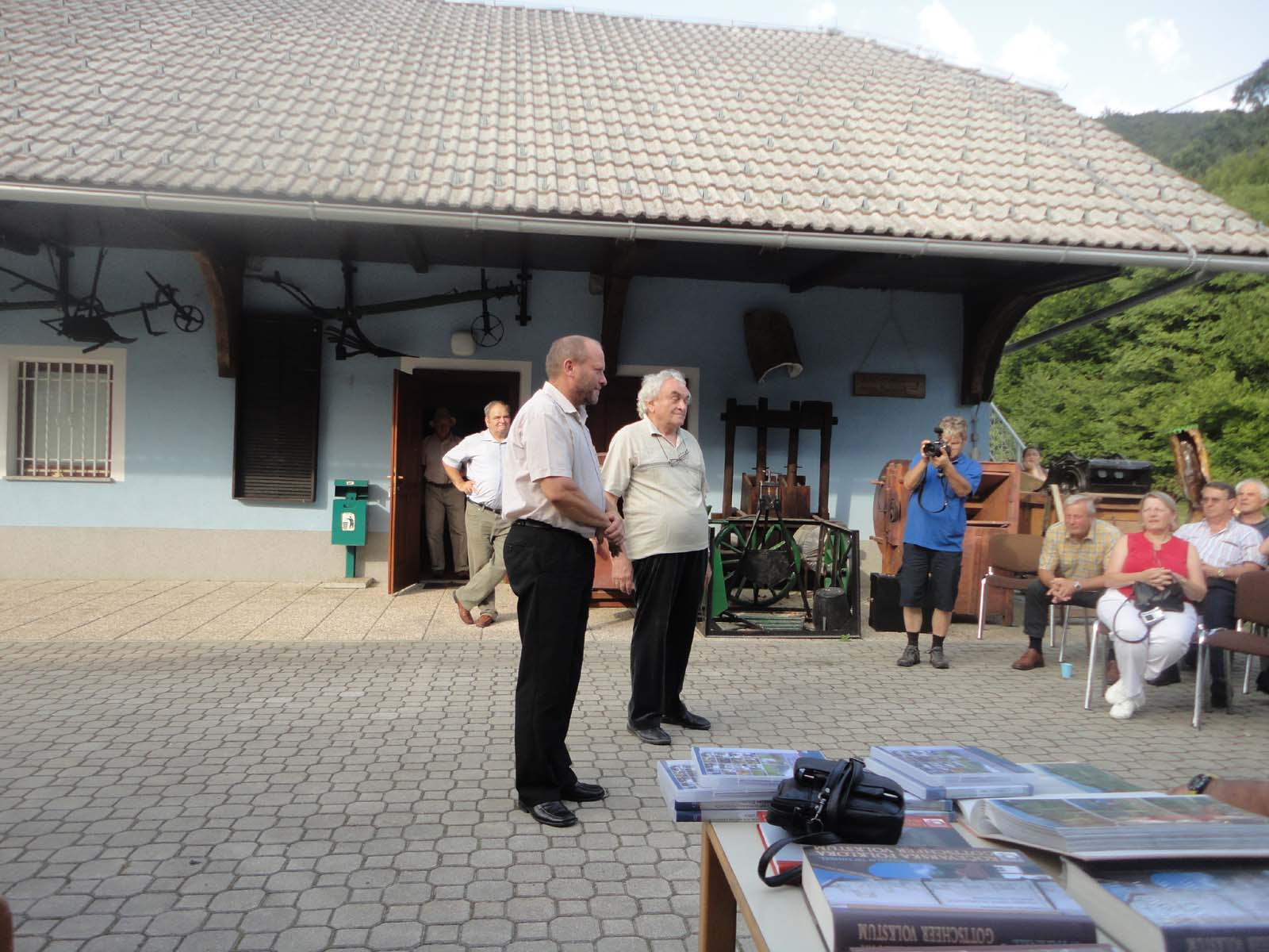 Prireditev Kočevarjev staroselcev v kočevarskem centru v Občicah: predsednik društva Avgust Gril in župan Dolenjskih Toplic Jože Muhič